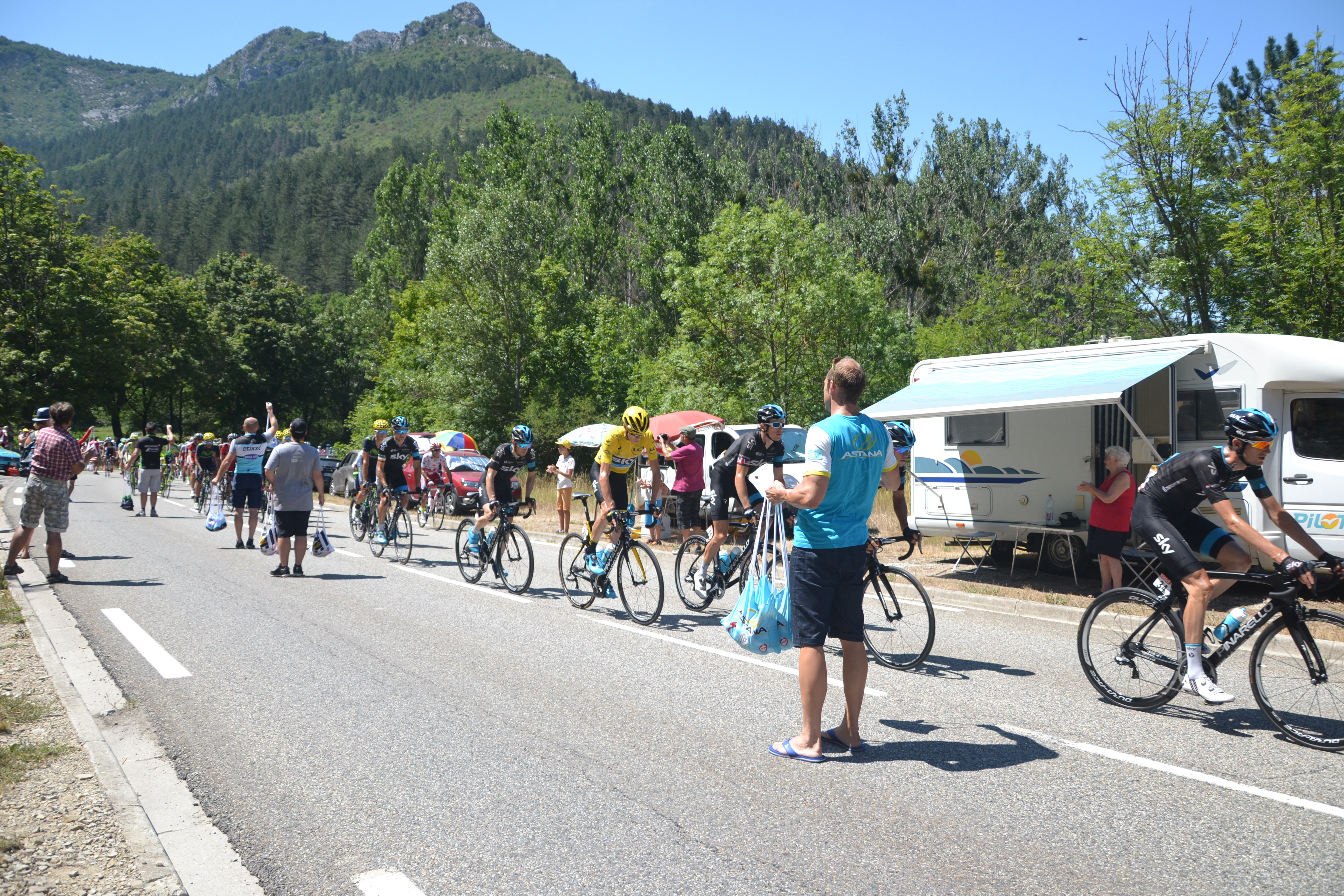 Durant la 16ème étape du Tour de France 2015